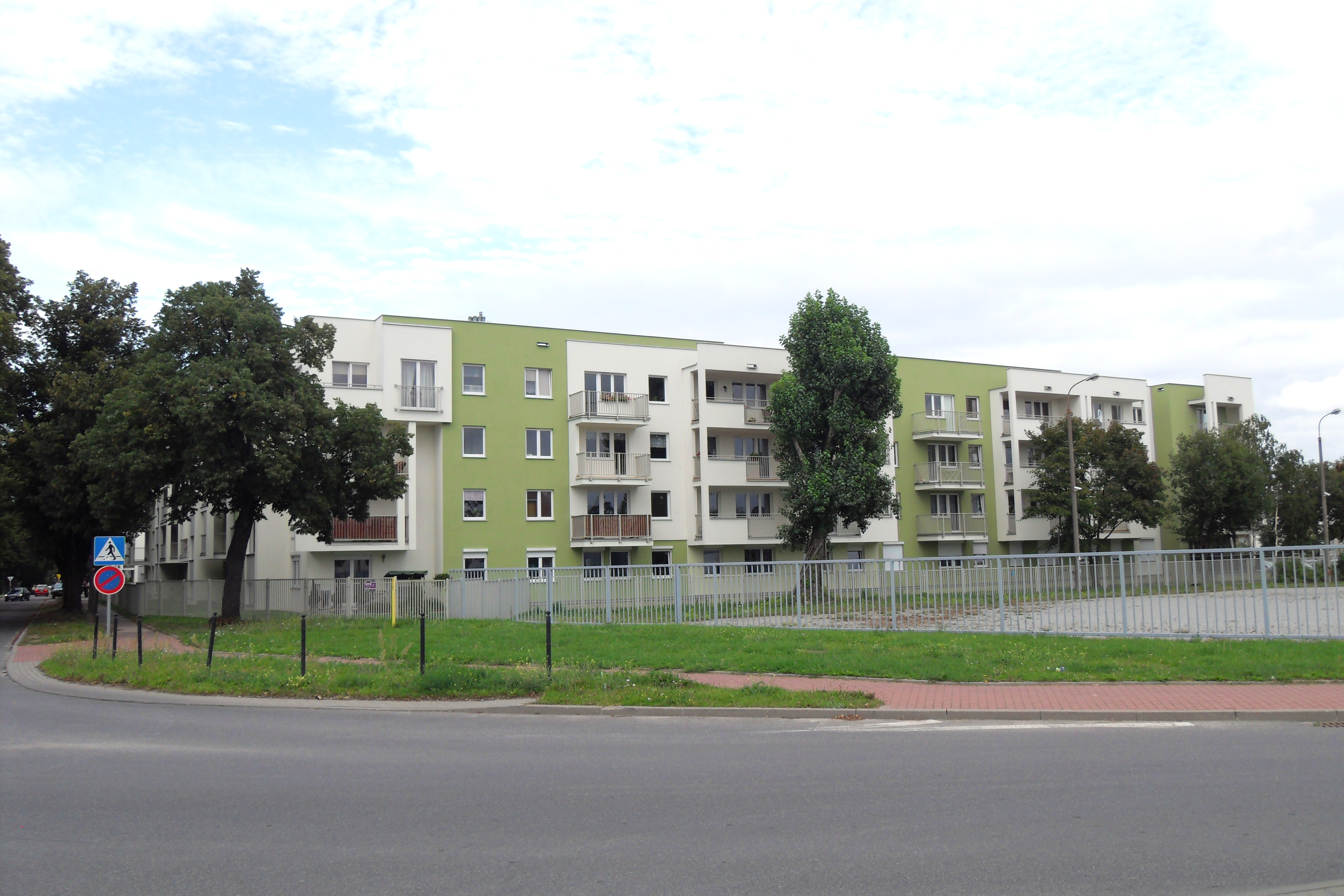 Gdańsk Przymorze Małe. Osiedle "Nova Oliva", ul. Słowiańska 34.